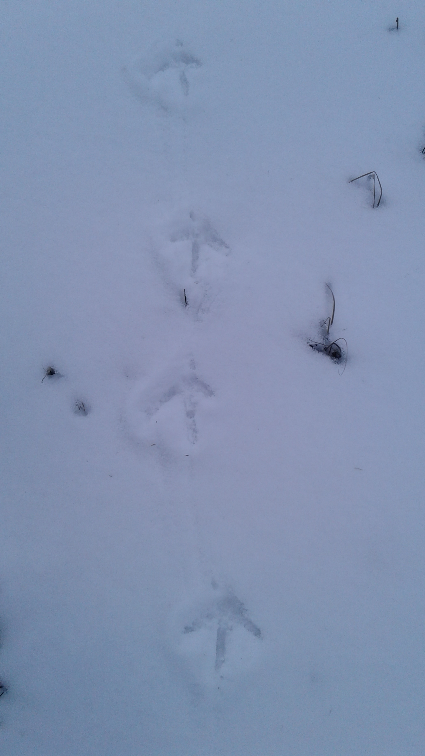 Знято у плавнях прибужжя